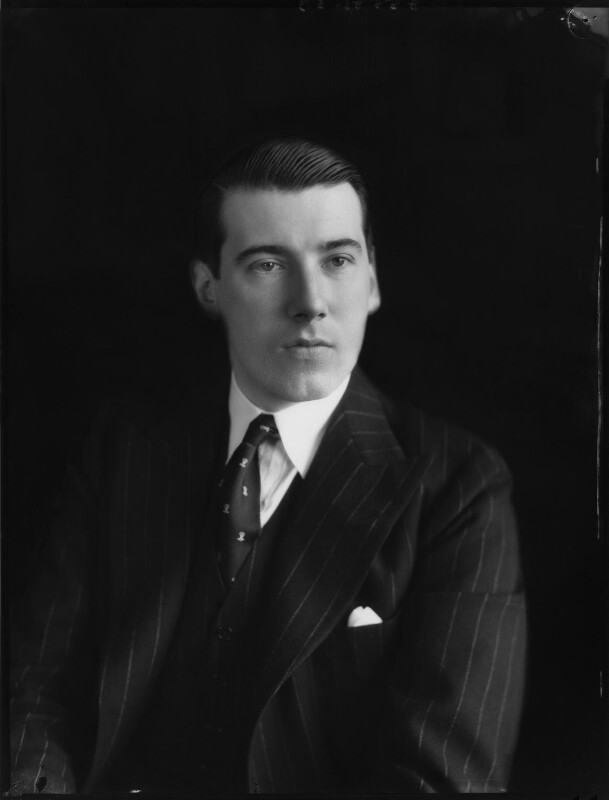 Viscount Berry